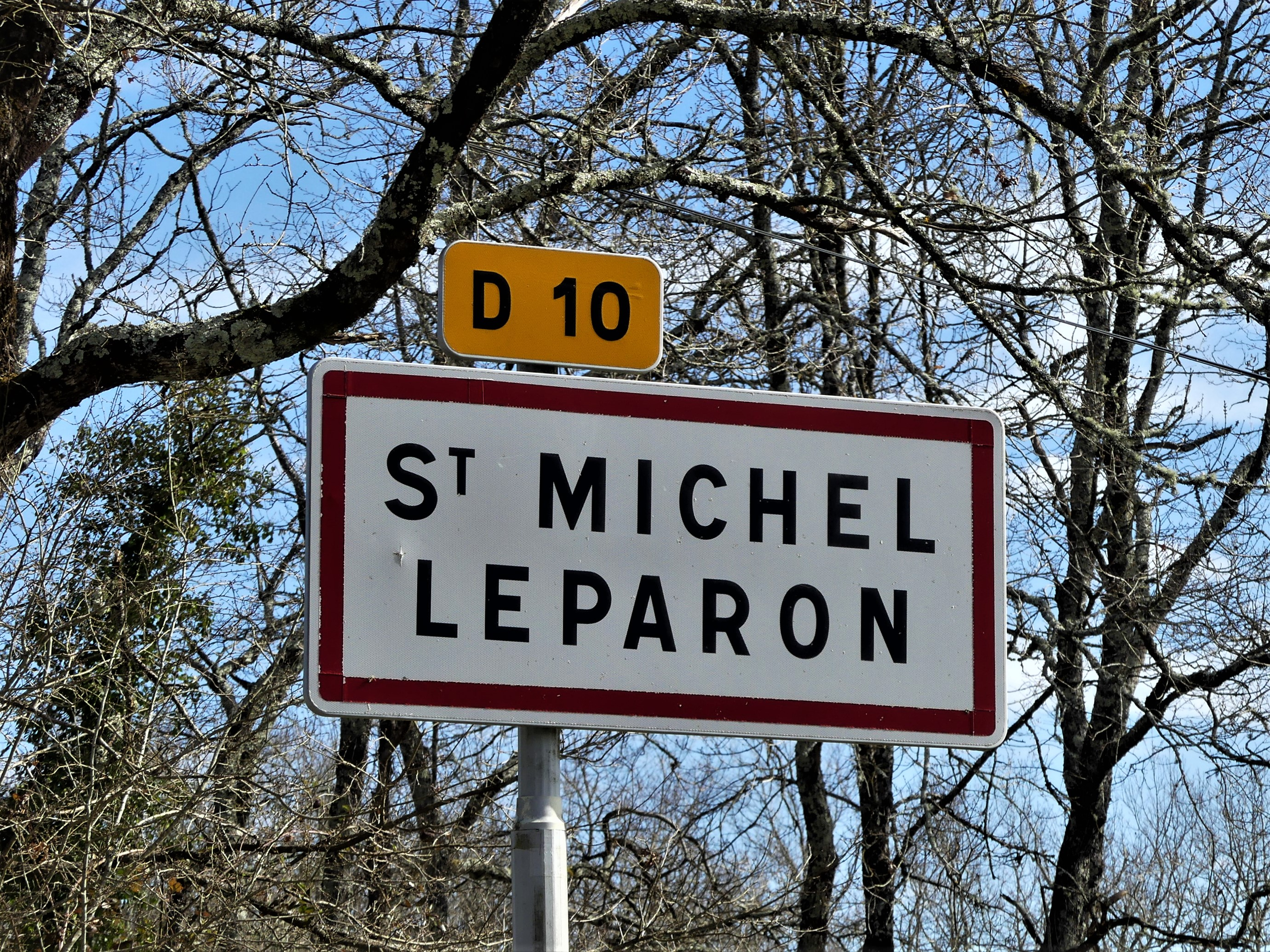 Panneau d'entrée dans le bourg de Saint-Michel-l'Écluse, commune associée de Saint-Michel-l'Écluse-et-Léparon, commune de La Roche-Chalais, Dordogne, France.